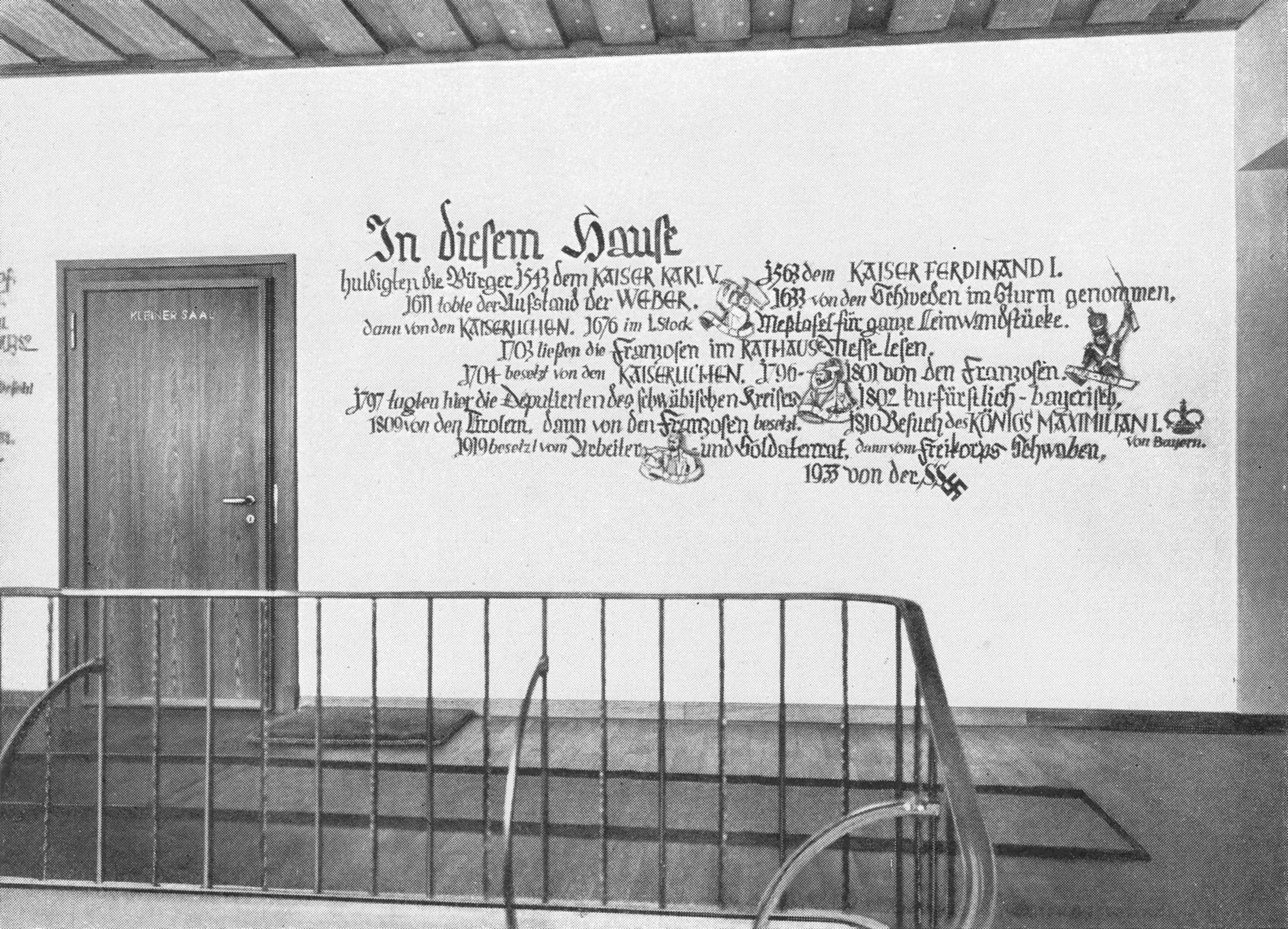 Wandschrift im Rathaus von Kempten. Wand des Treppenhauses im Rathaus vom Zugang zum Kleinen Saal.